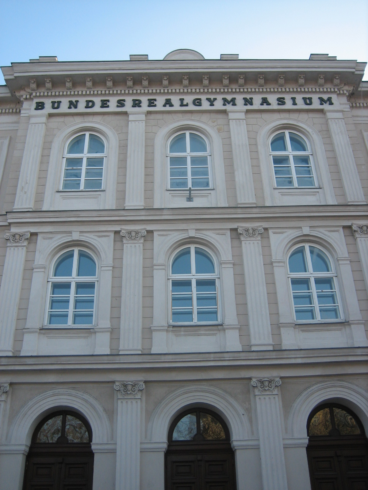 BRG Krems Ringstrasse / Ansicht Ringstrassen-Front